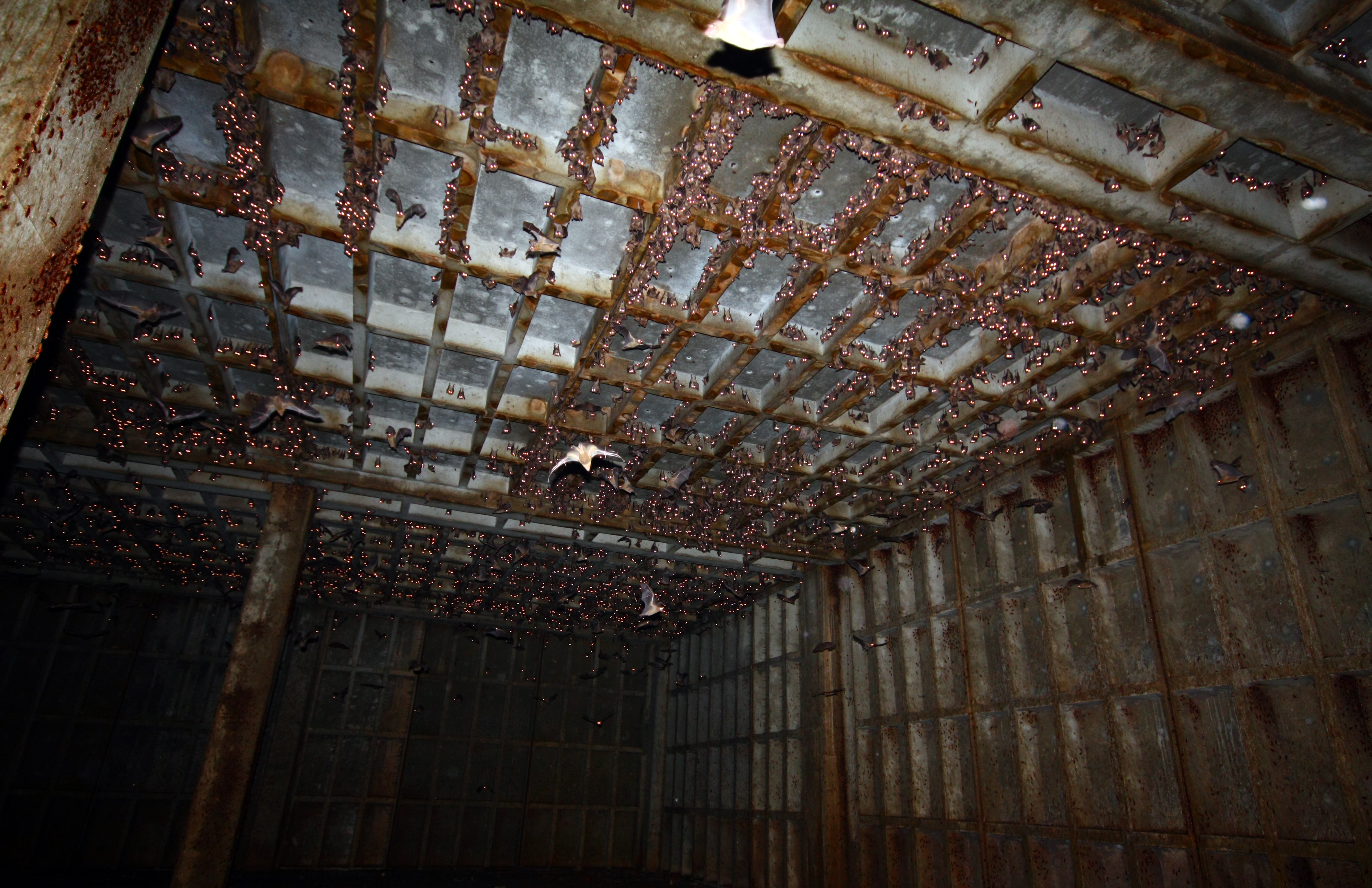 מושבת העטלפים ב"בניין השוק" בחדרה כמה שנים לפני הריסתו.